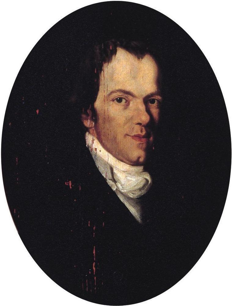 Portrait de Philippe-Albert Stapfer vers 1820, huile sur bois d'auteur inconnu (Château de Talcy)